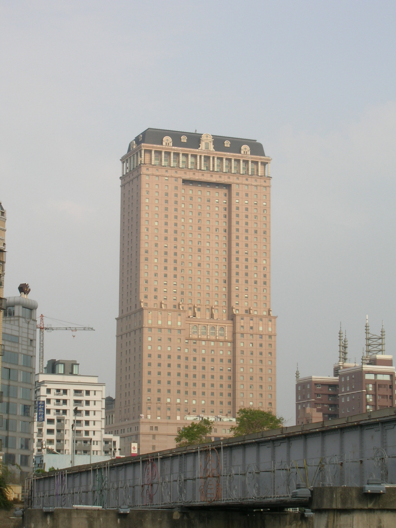 位於臺灣高雄市前金區的漢來新世界中心。